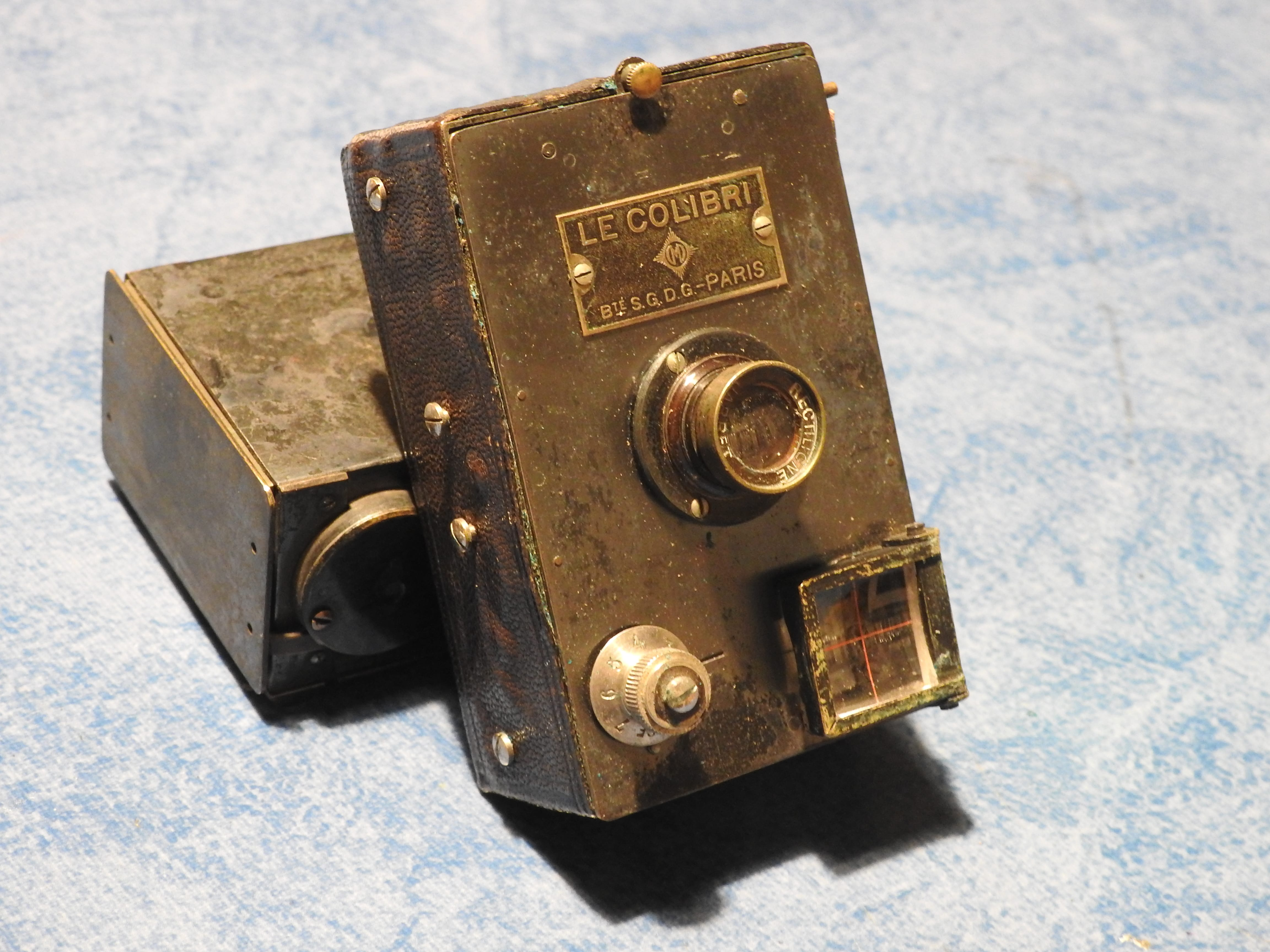 Le Colibri, appareil photo de poche pliant de format 4 ½ x 6, conçu par Étienne Mollier en 1902.